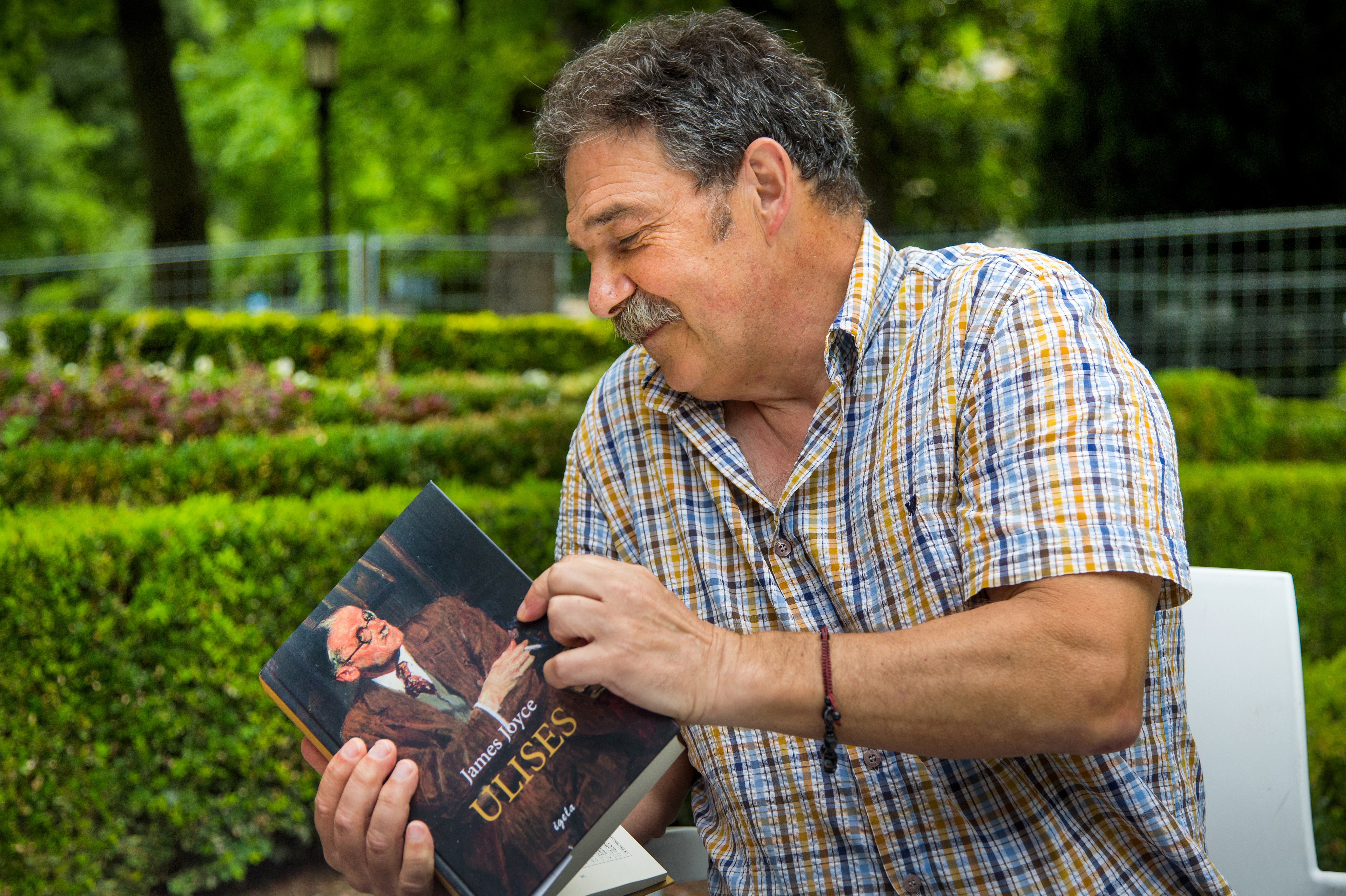 Xabier Olarra idazlea. Argazkilaria: Dani Blanco.